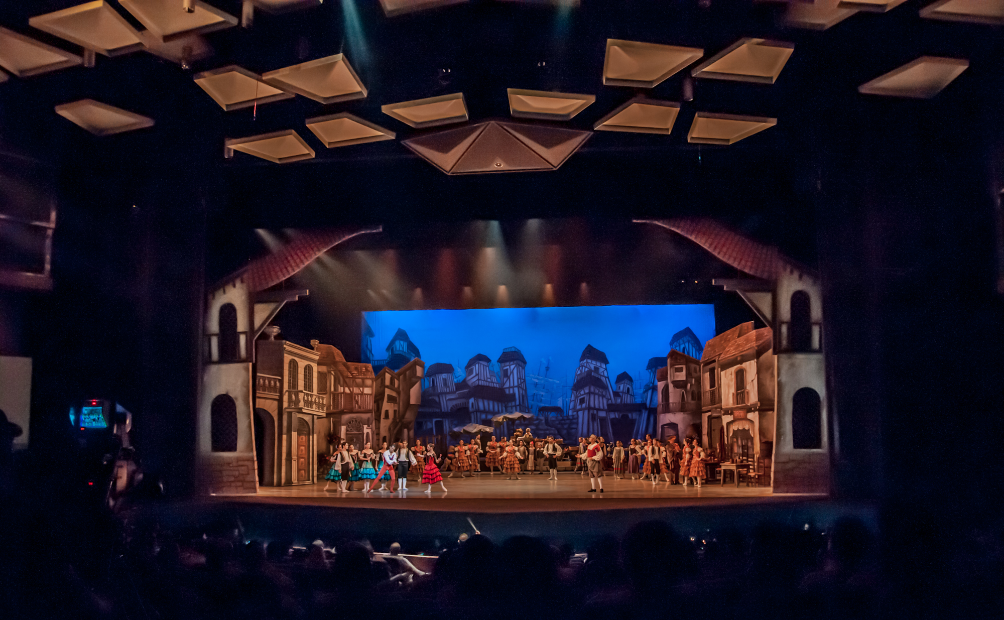 Don Quijote. Música: Ludwig Minkus. Coreografía: Laura Fiorucci basada en la original de Marius Petipa. Ballet Teresa Carreño. Teatro Teresa Carreño. Venezuela, 18 de octubre de 2013.